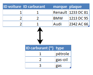 relation entre deux tables grâce au clé étrangere